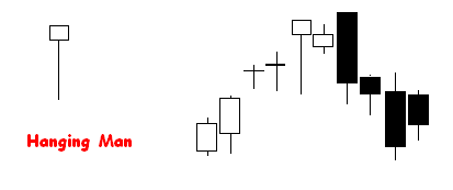 Analisi Tecnica, Candele giapponesi, Hanging Man.